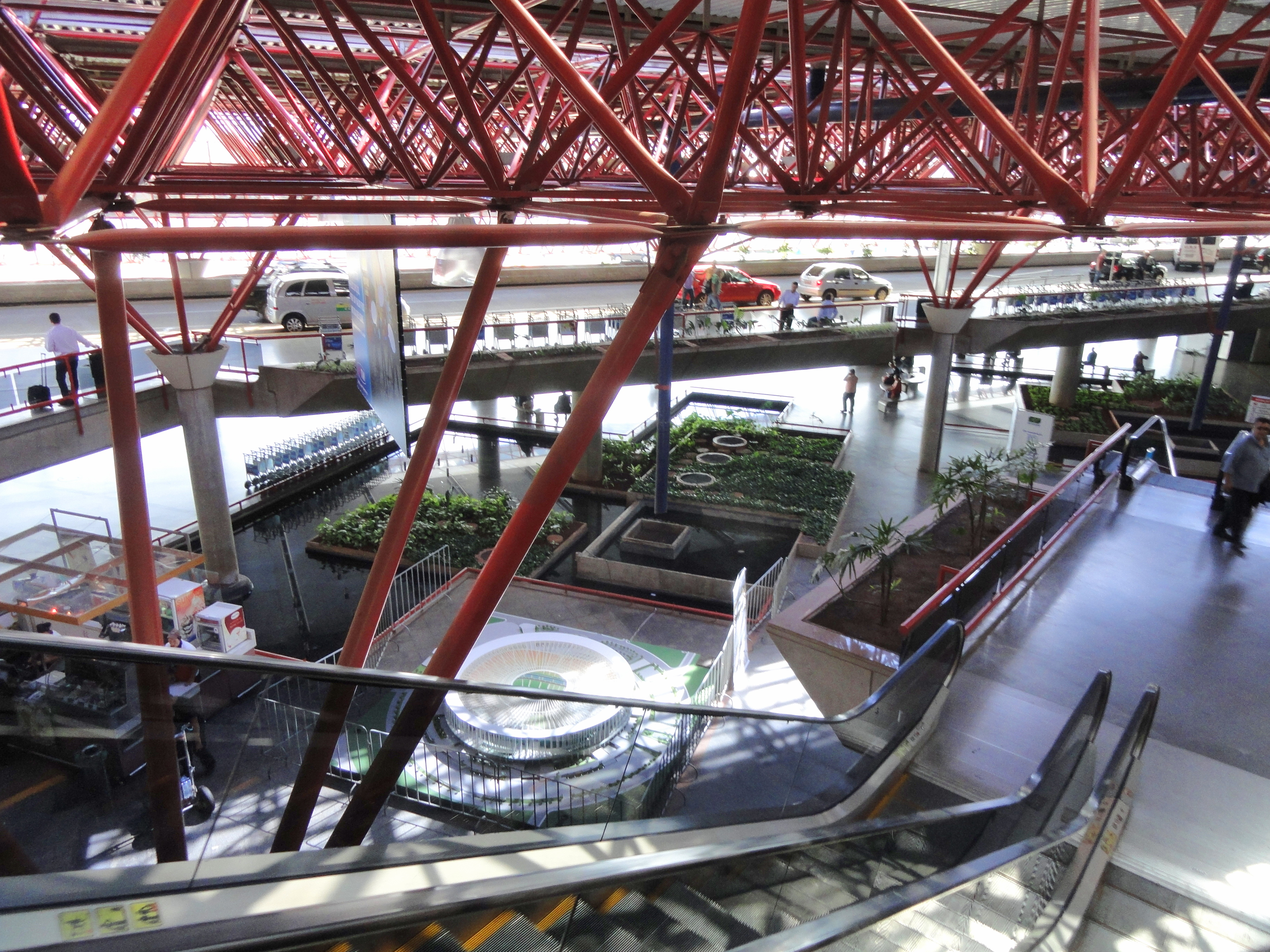 Brasília International Airport, Brasília, Brazil.